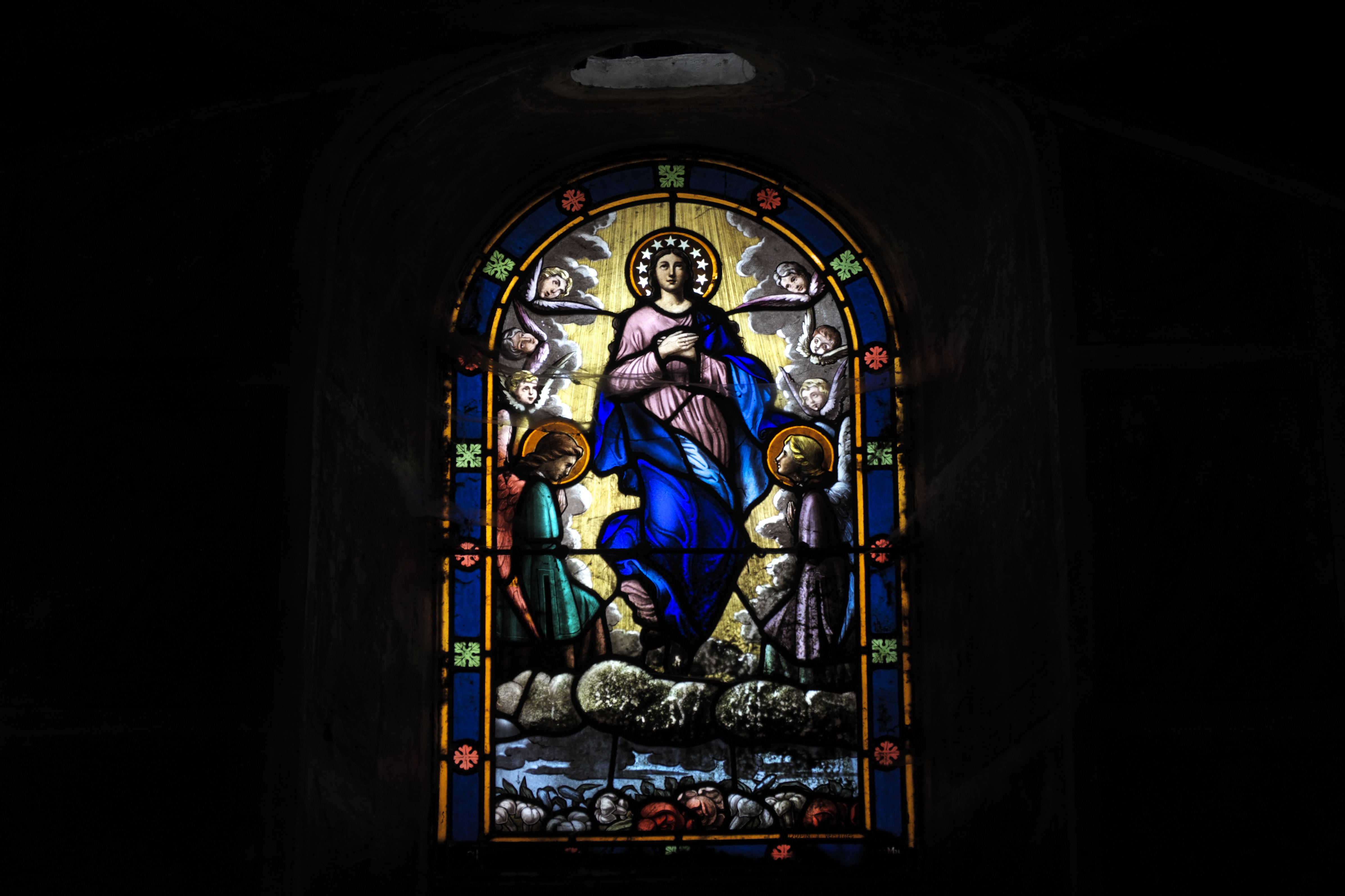 Katholische Pfarrkirche Notre-Dame-de-l'Assomption (Mariä Himmelfahrt) in Boigneville im Département Essonne (Île-de-France/Frankreich), Bleiglasfenster mit der Signatur DUPIN à Versailles; Darstellung: Mariä Himmelfahrt